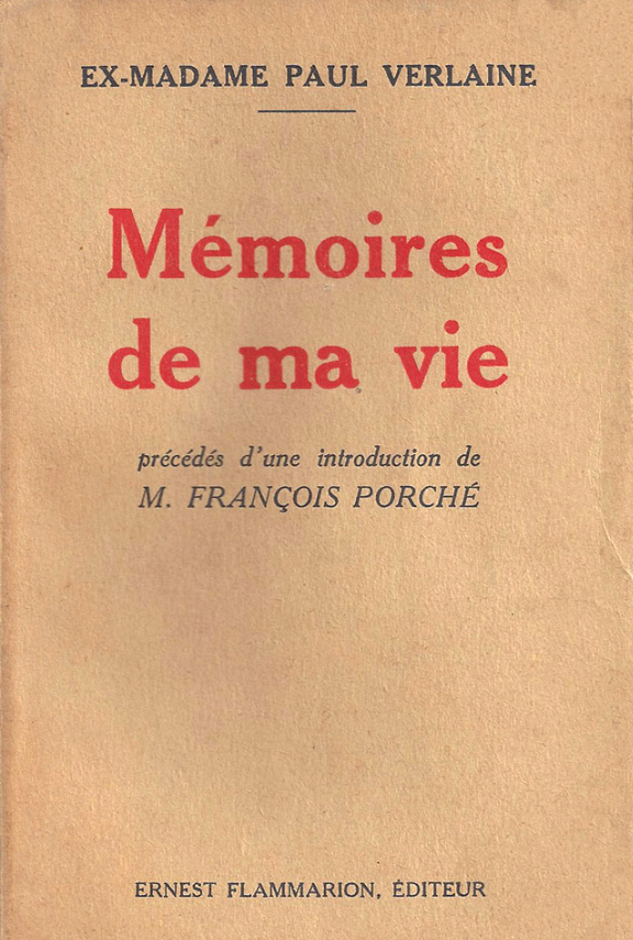 Mathilde Mauté (1853-1914) - Mémoires de ma vie - Falmmarion, 1935